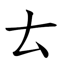 тэ чжуинь